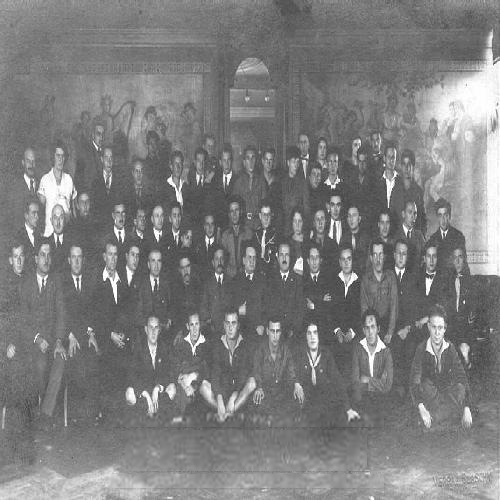 ועידה עולמית של נוער ציוני ( " בלאוו וייס" ) , דנציג ( סוף 1924) , יושבים בשורה הראשונה משמאל לימין: 2.לוי שקולניק - אשכל, 4. אבא חושי, 6. דוד בן גוריון, 7. מאיר יערי, 8. יוסף שפרינצק, 9. האנס קון, על הרצפה יושבים מימין לשמאל: 2. בנדמן וולטר מוזס, קיצוני. הערת אברהם אריאל: אביו אביגדור (ויקטור) אריאל (גלמבוצקי) אשר ייסד את סניף השומר הצעיר בברזיל, השני מימין בשורה התחתונה היושבת על הרצפה. יתכן כי לא מדובר בכנס של "בלאו וייס" אלא כנס רב תנועתי (הערה מתאריך 4.12.16)